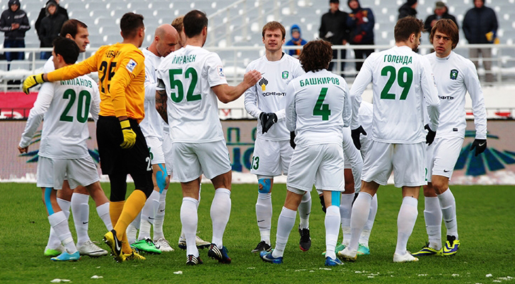 Футболисты ФК «Томь» перед игрой с ФК «Урал» 26/04/2014